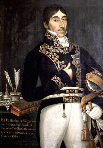 Hipólito de Villegas (Chile)